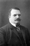 Wilhelm Spindler (1861-1927) Bayerischer Landtagsabgeordneter (Zentrum)